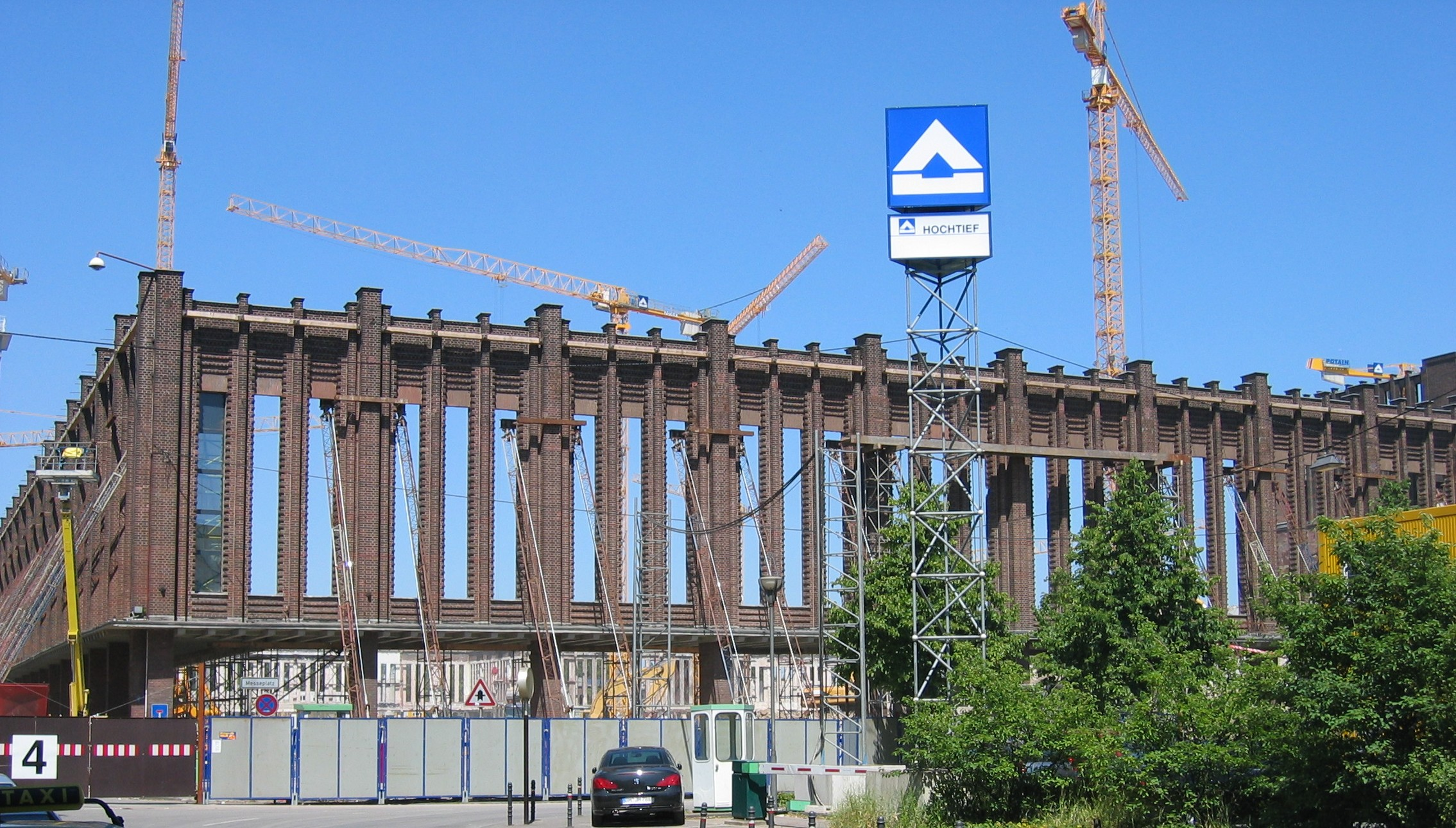 denkmalgeschützte Fassade der Kölner Messehallen